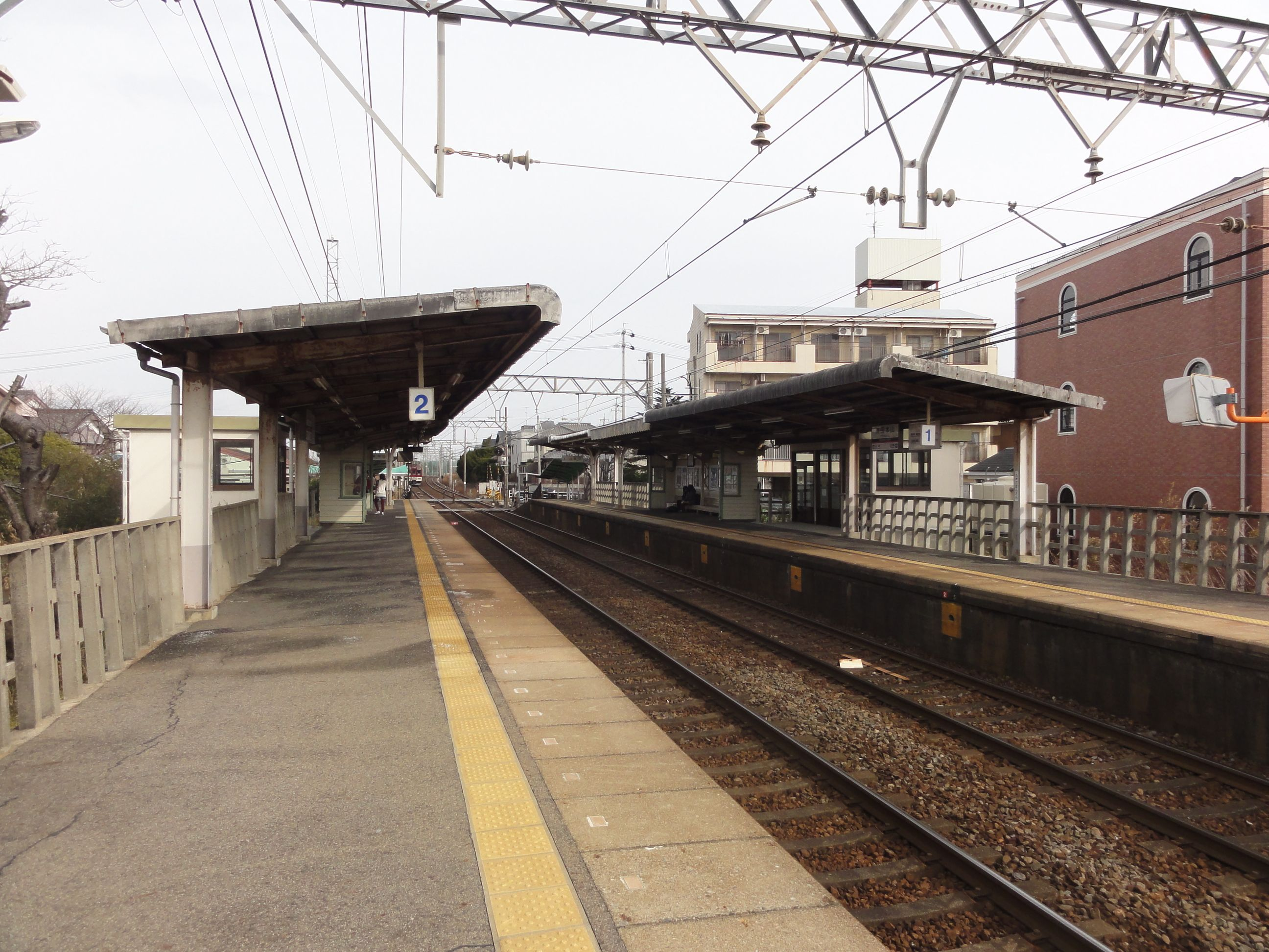 高田本山駅ホーム